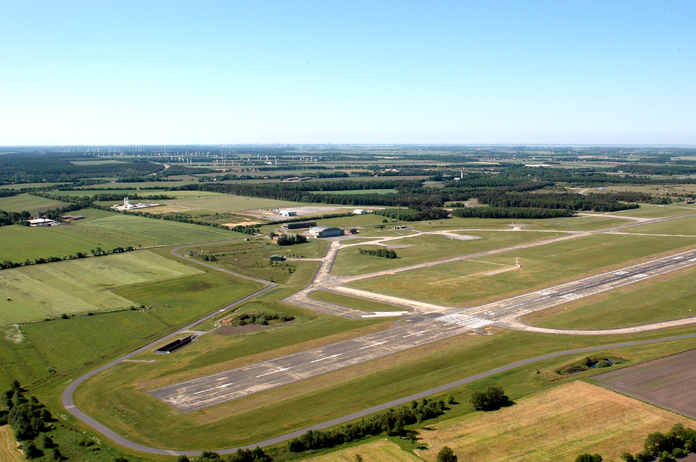 Fotoflug vom Flugplatz Nordholz-Spieka über Cuxhaven und Wilhelmshaven